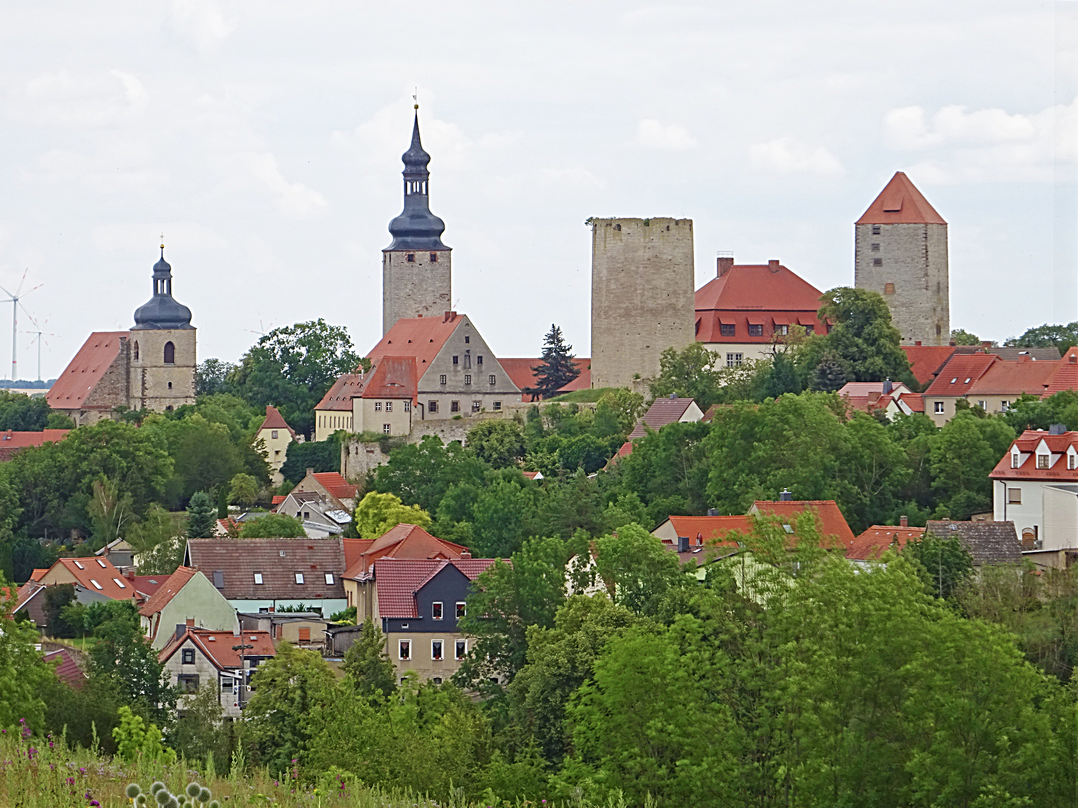 Querfurts Skyline von Westen: vlnr. St. Lamperti, Pariser Turm, Dicker Heinrich, Fürstenhaus und Marterturm